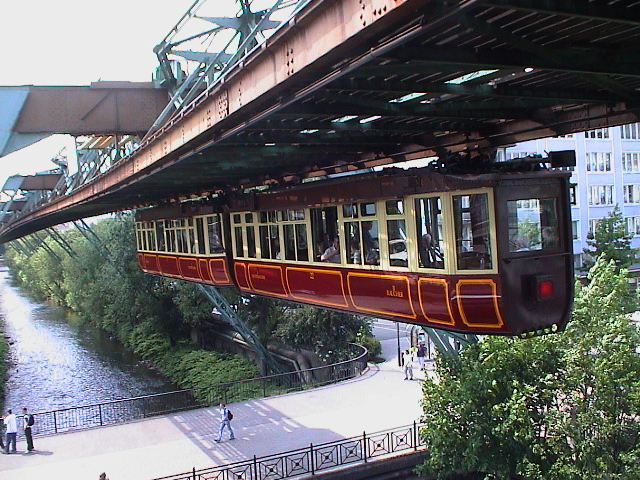 Schwebebahn Wuppertal, Kaiserwagen. Wupperbrücke Schöneberger Ufer. fotografiert von Benutzer JuergenG am 4.6.2003